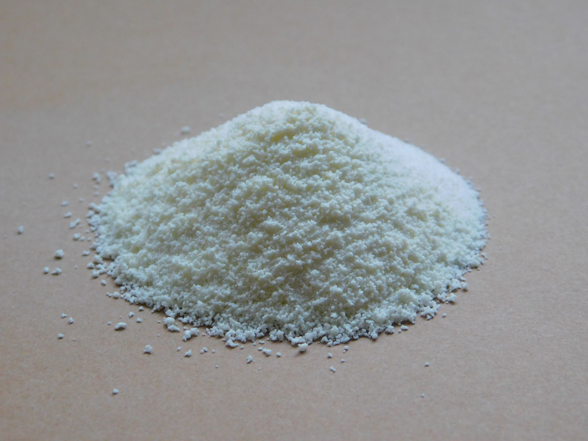 Piimapulber